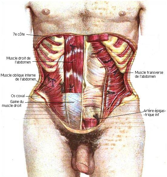 paroi antérieure de l'abdomen